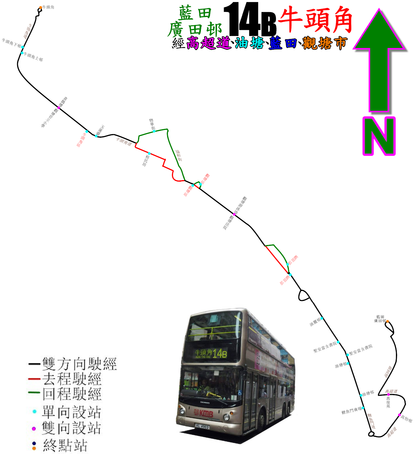 中文（香港）: 九巴14B線的走線圖